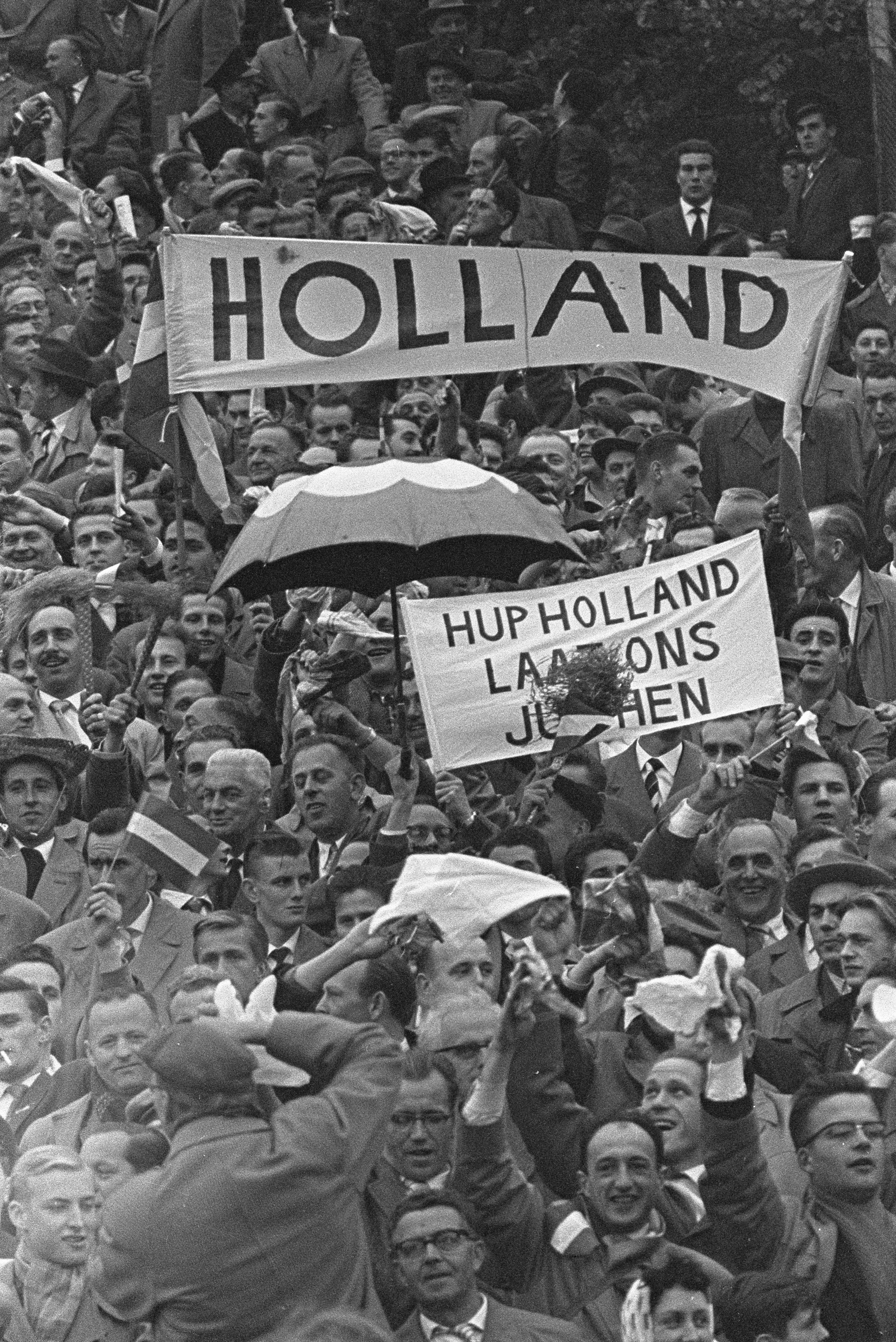 Collectie / Archief : Fotocollectie Anefo Reportage / Serie : Voetbal Duitsland - Nederland 7-0 in Keulen Beschrijving : Nederlandse supporters voor de wedstrijd Datum : 21 oktober 1959 Locatie : Duitsland, Keulen Trefwoorden : sport, supporters, voetbal Fotograaf : Noske, J.D. / Anefo Auteursrechthebbende : Nationaal Archief Materiaalsoort : Negatief (zwart/wit) Nummer archiefinventaris : bekijk toegang 2.24.01.05 Bestanddeelnummer : 910-7644